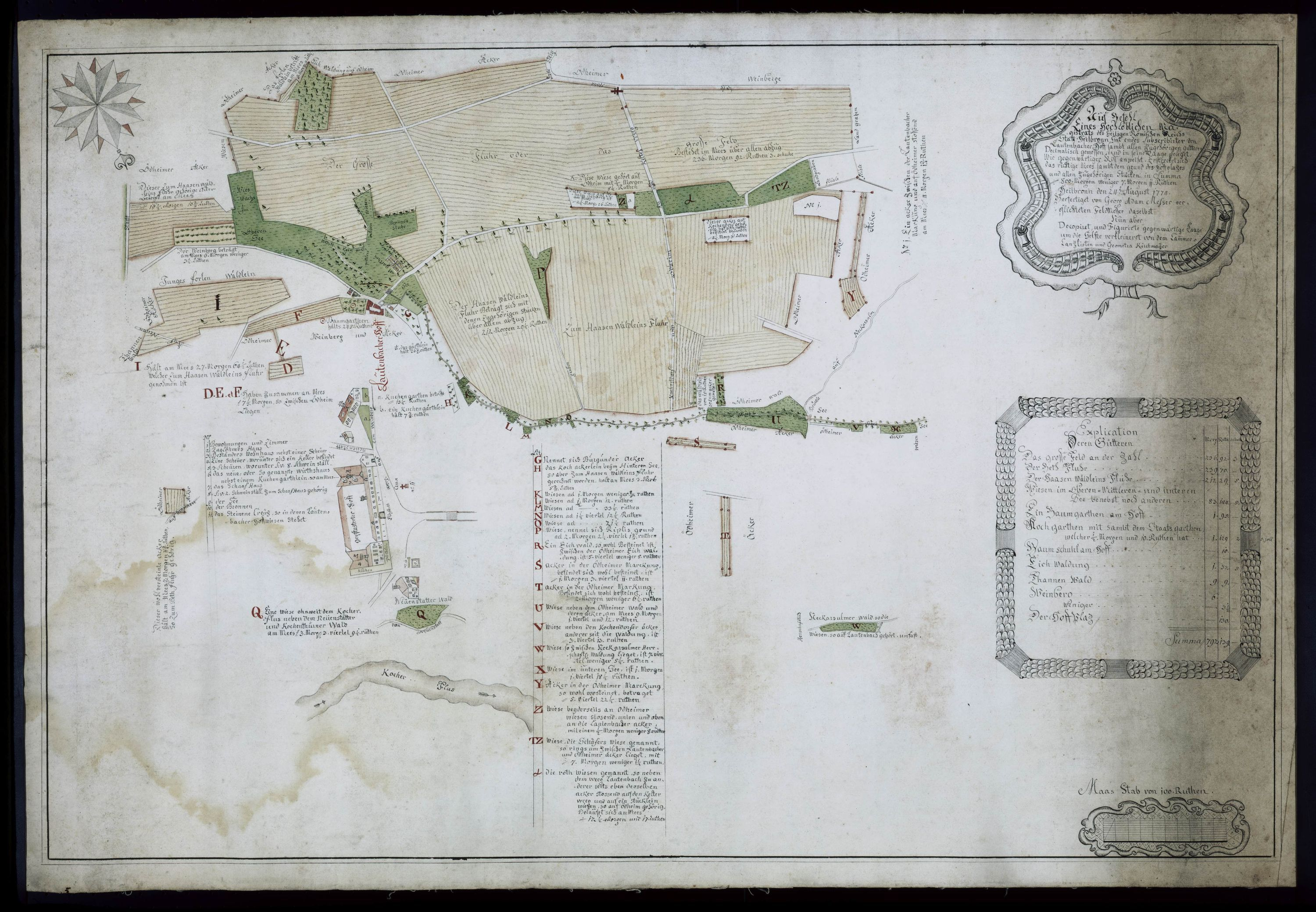 Karte der zum Lautenbacher Hof gehörigen Güter, 1774